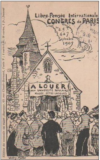 Libre pensée internationale Congrès de Paris 4, 5, 6, 7 septembre 1905 par Valéry Müller (Éditions du Congrès de Paris, 63 rue Claude-Bernard Paris [5e]).